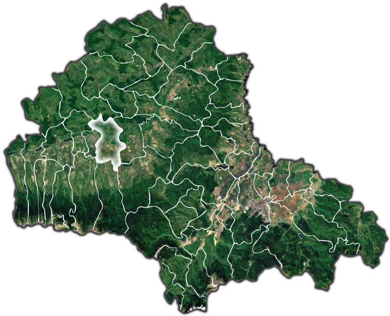 Mandra jud Brasov